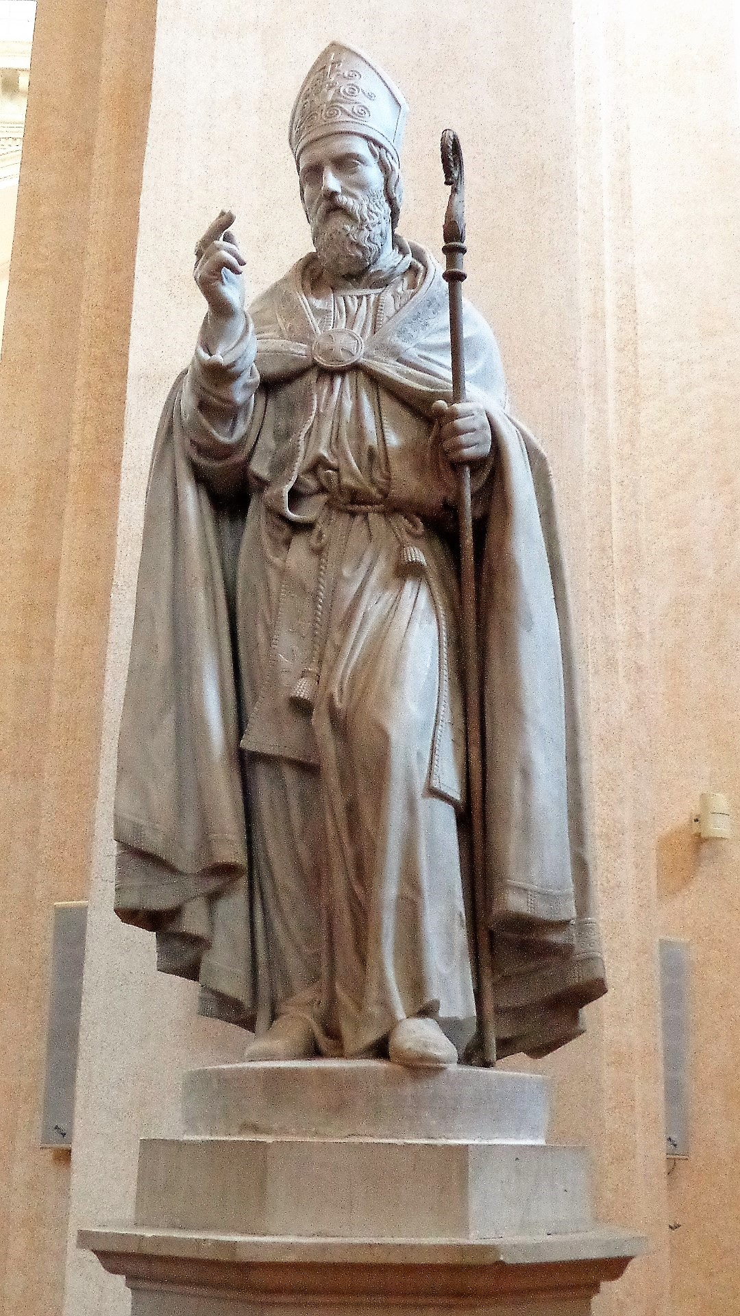 Statua